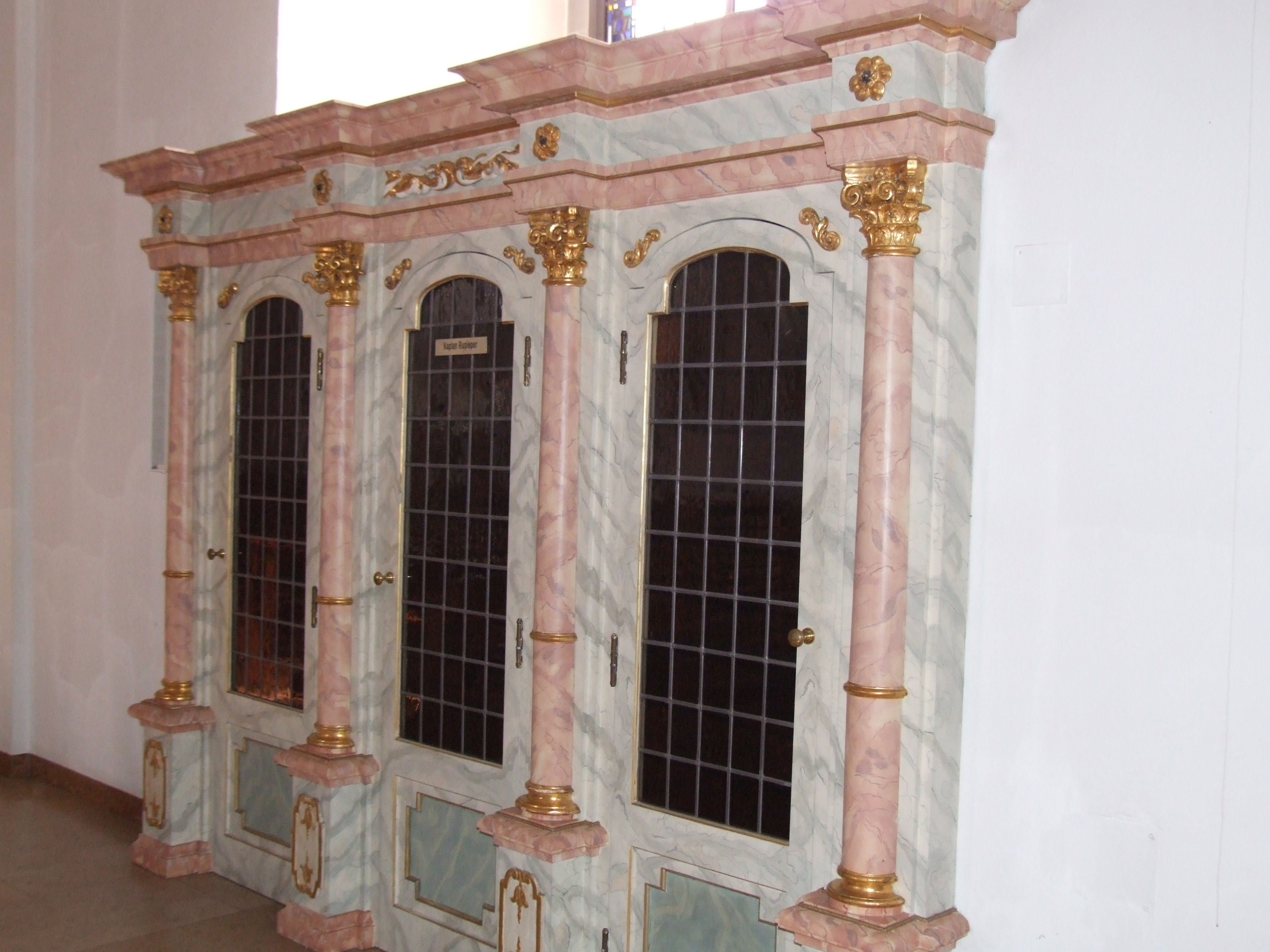 Pfarrkirche St. Vitus in Löningen